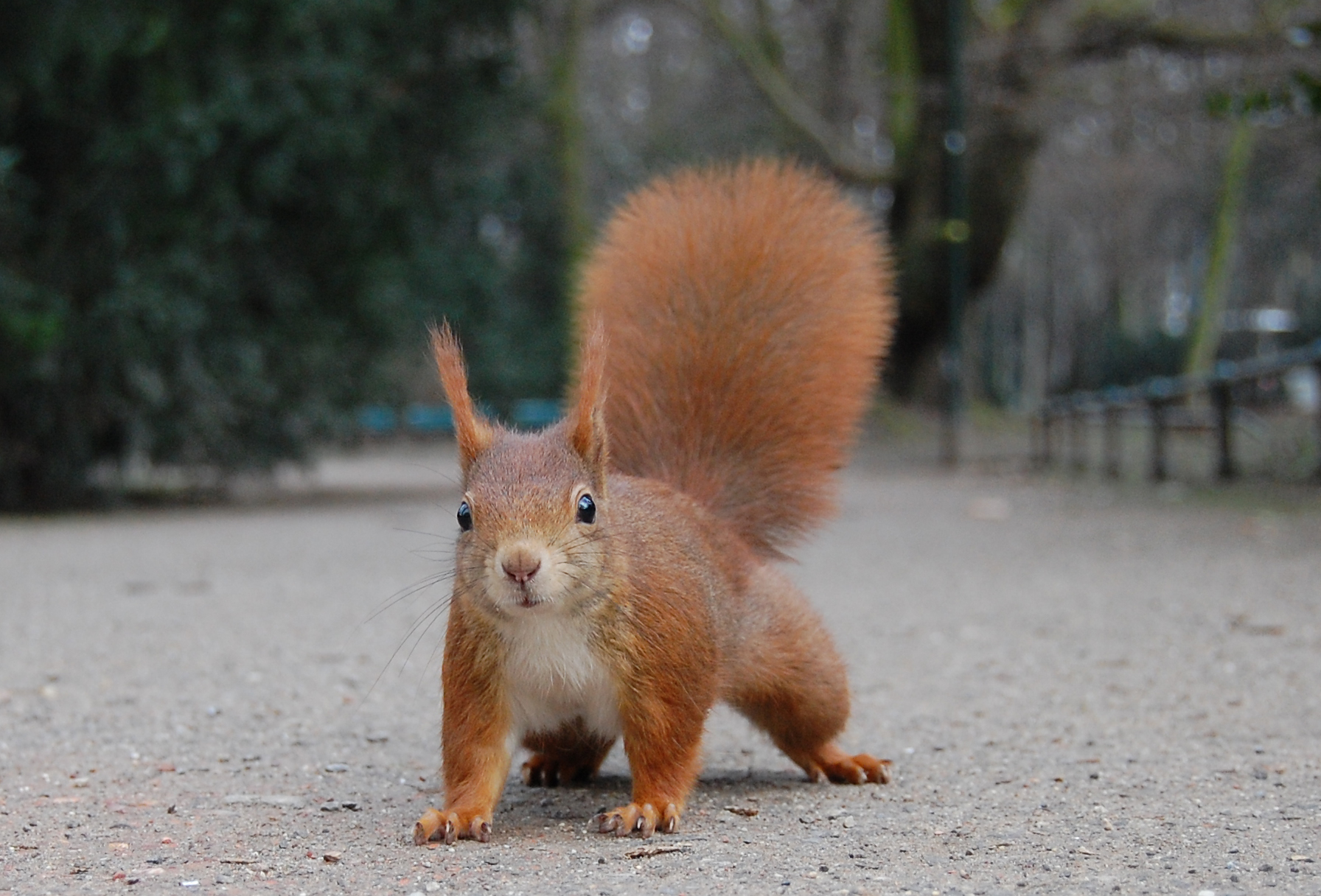 Eichhörnchen (Sciurus vulgaris) mit ausgeprägten winterlichen Ohrpinseln im Düsseldorfer Hofgarten